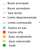 Légende